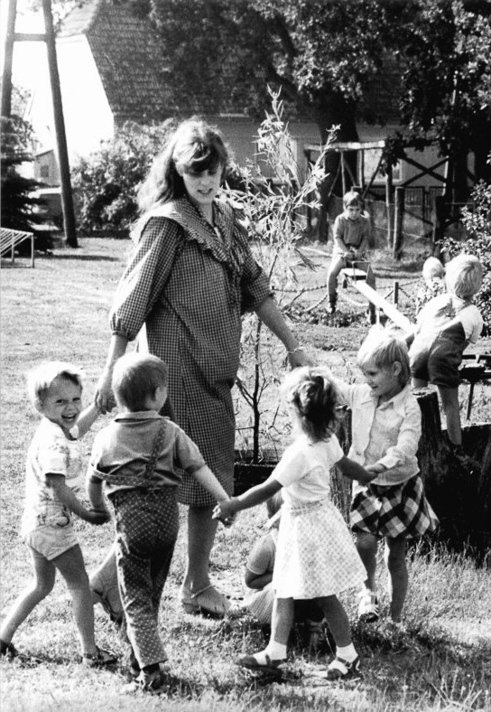 Lübsse, Blick in den Erntekindergarten ADN-ZB Pätzold 5.8.86 Bez. Schwerin: Ernte-Wohl behütet sind auch in diesen Erntewagen die Kinder der Genossenschaftsbauern bei der Erzieherin Kerstin Oldenburg im Kindergarten Lübsse. Bei Bedarf ist diese Einrichtung während der Zeit der Ernte auch an Wochenenden geöffnet. (siehe 14, 15, 17 N)